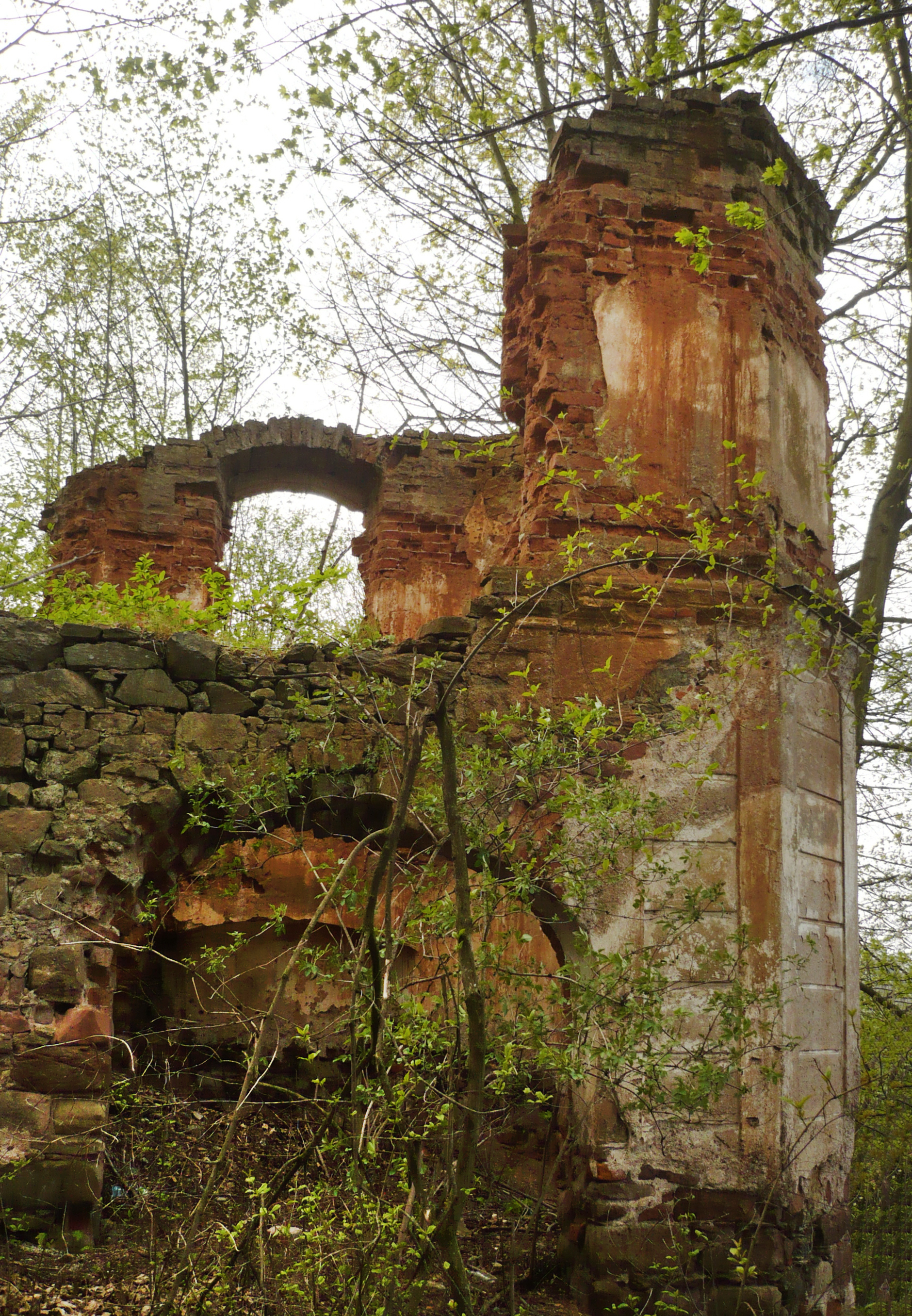 Oranżeria w Piszkowicach